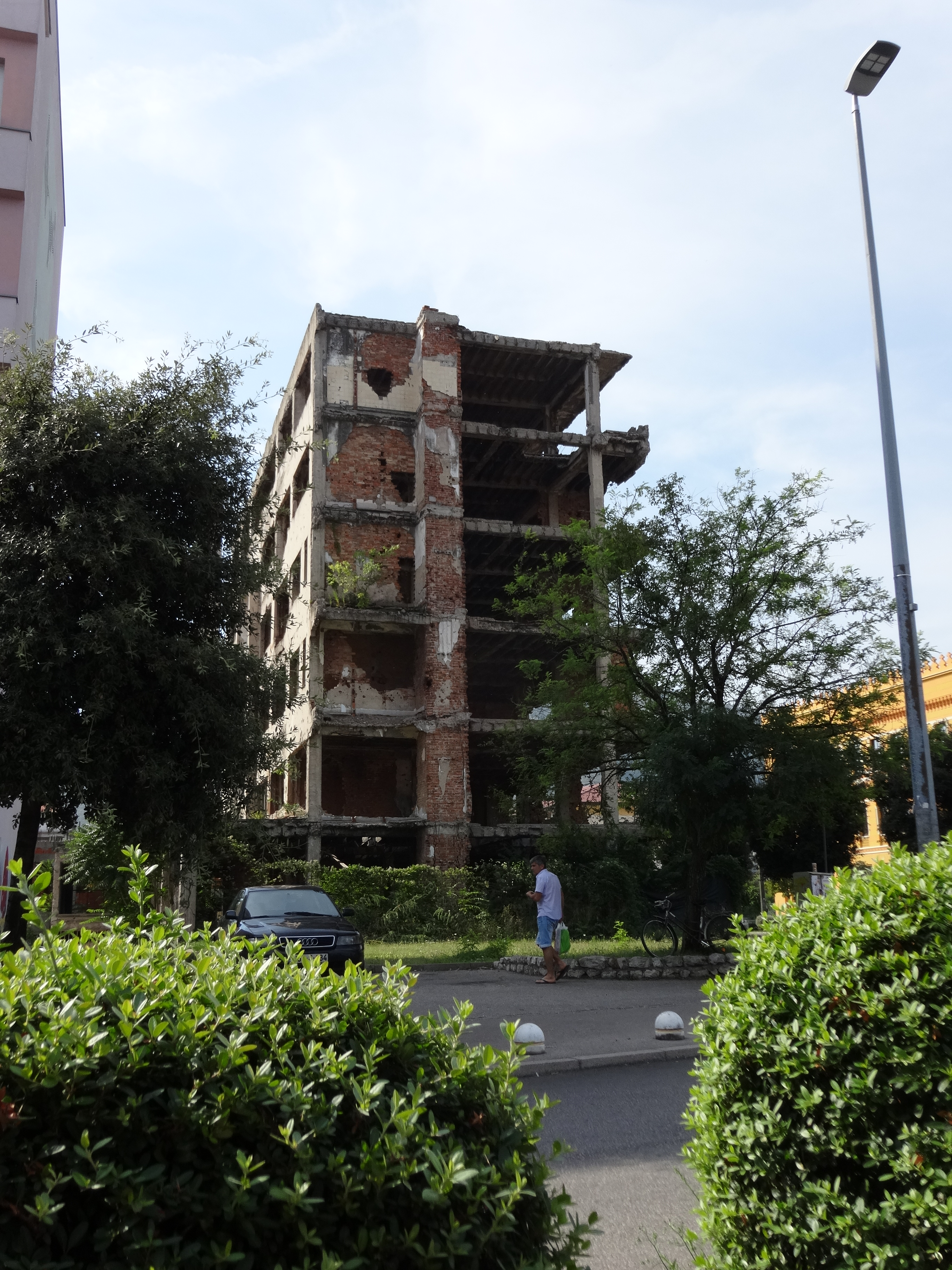 Nach dem Krieg noch unverändert stehende Ruine in Mostar